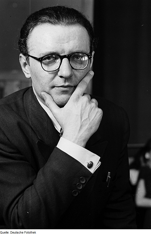 Original image description from the Deutsche Fotothek Porträt Horst Kudritzkis?